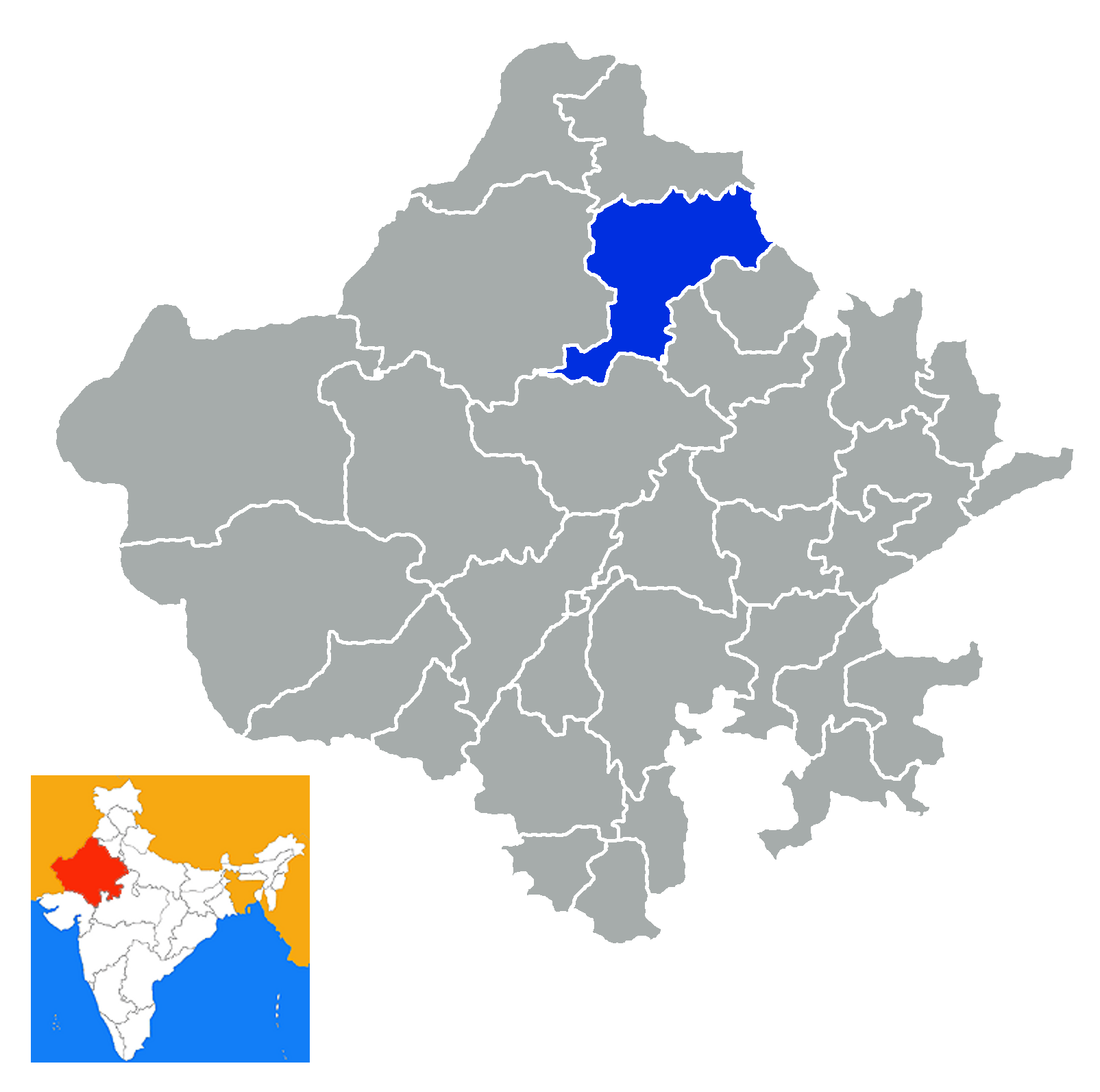 Distrito de Churu Rajastan India